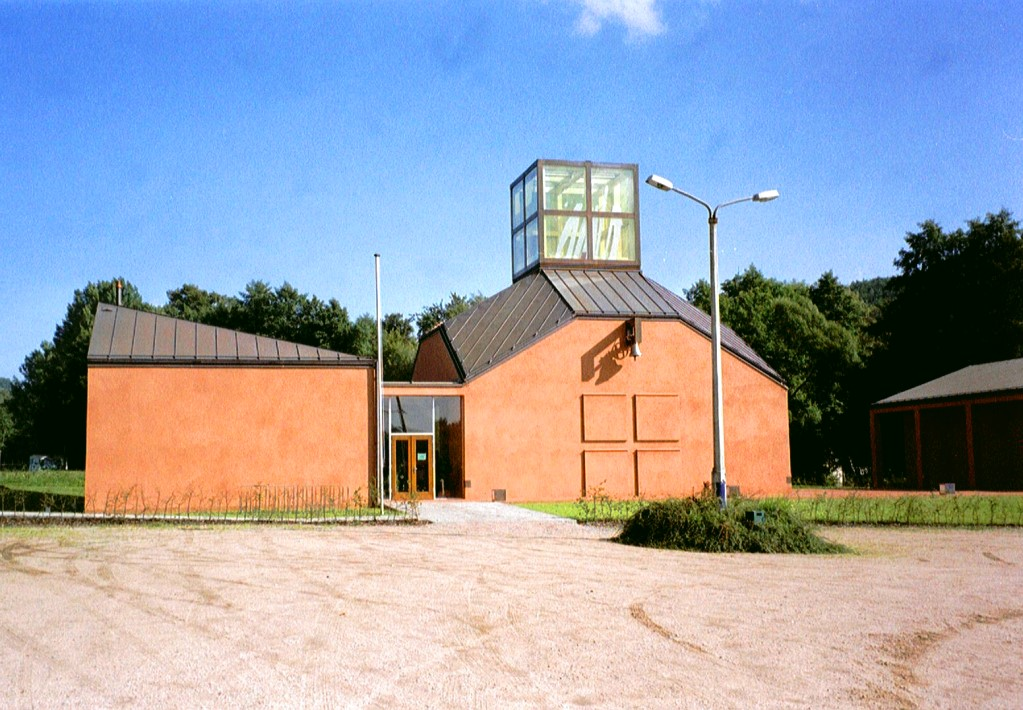 Kath. Kirche St. Kilian in Bad Liebenstein (Außenansicht)